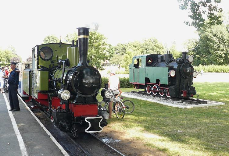 Parowóz Maltanka